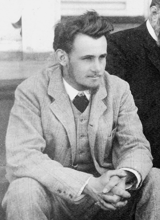 George Vernadsky in Poltava